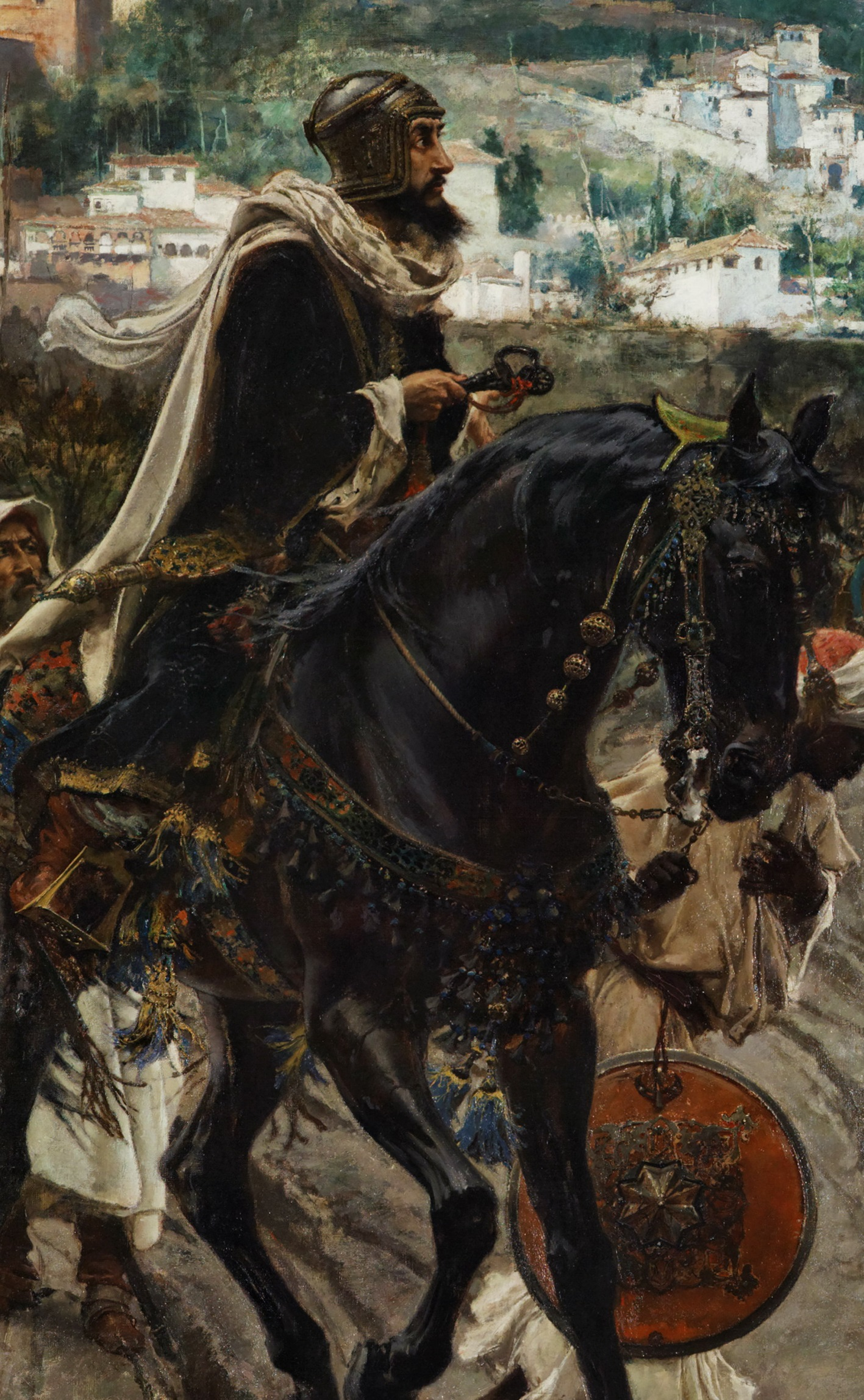 آخر مُلُوك غرناطة أبو عبد الله محمد الثاني عشر يُسلِّم غرناطة آخر معاقل المُسلمين في الأندلُس إلى الملك الكاثوليكي فرديناند الثاني الأراغوني، لِتسقط بِذلك الأندلُس وتقوم على أنقاضها الإمبراطوريَّة الإسپانيَّة.